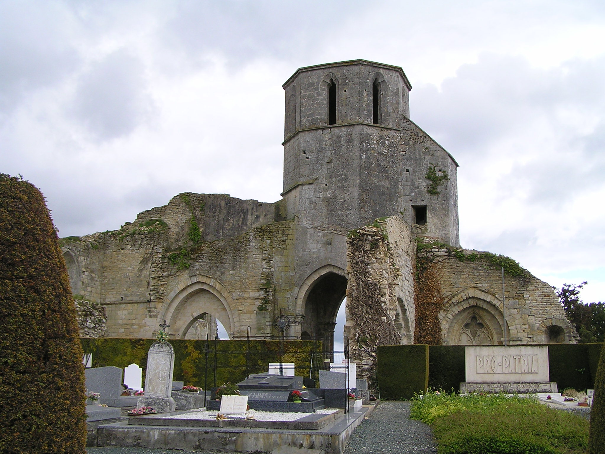 clocher de l'église du prieuré saint-étienne de Marans en Charente-Maritime